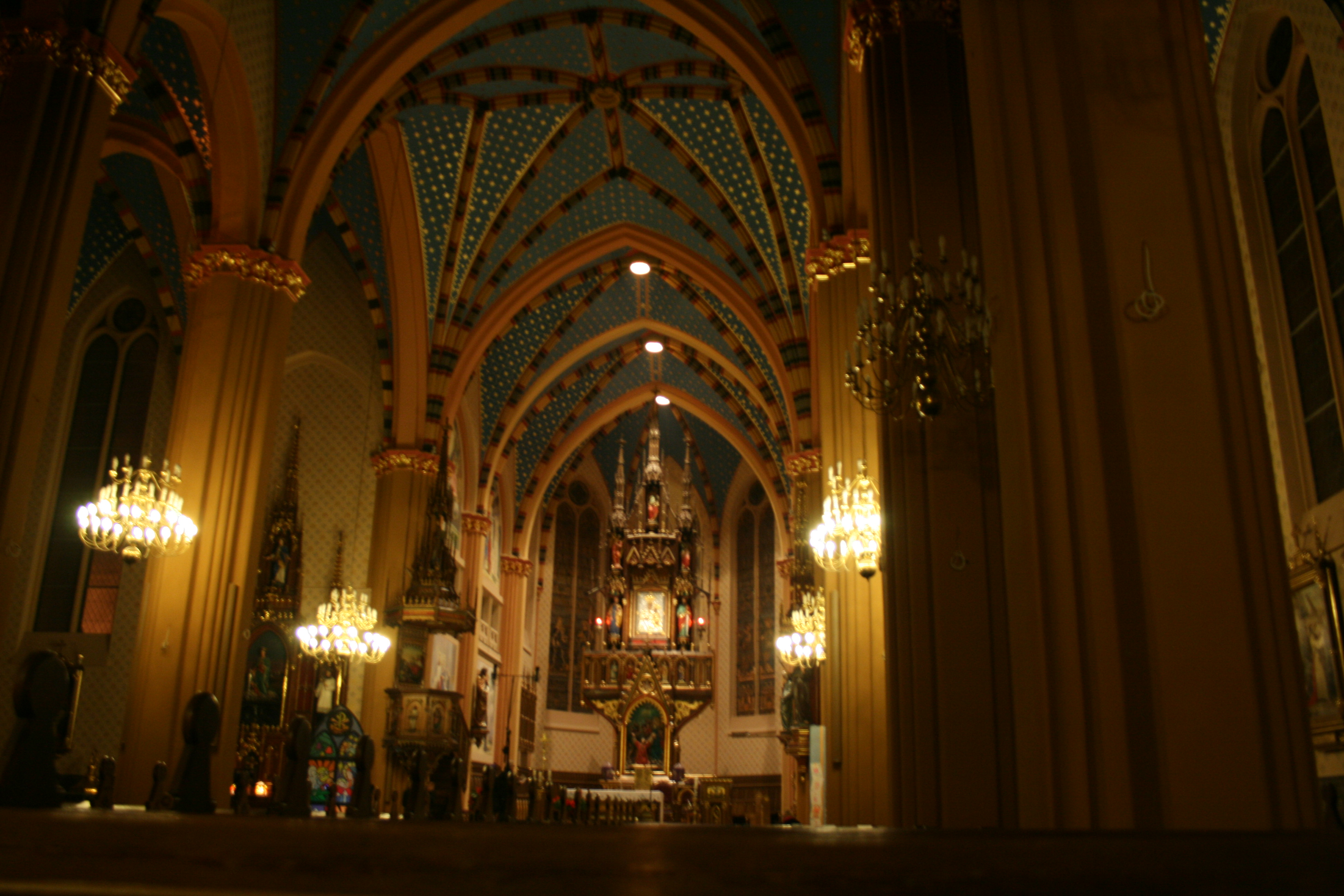 Wnętrze Sanktuairum MB Boguckiej w Katowicach, ul. Markiefki 89.